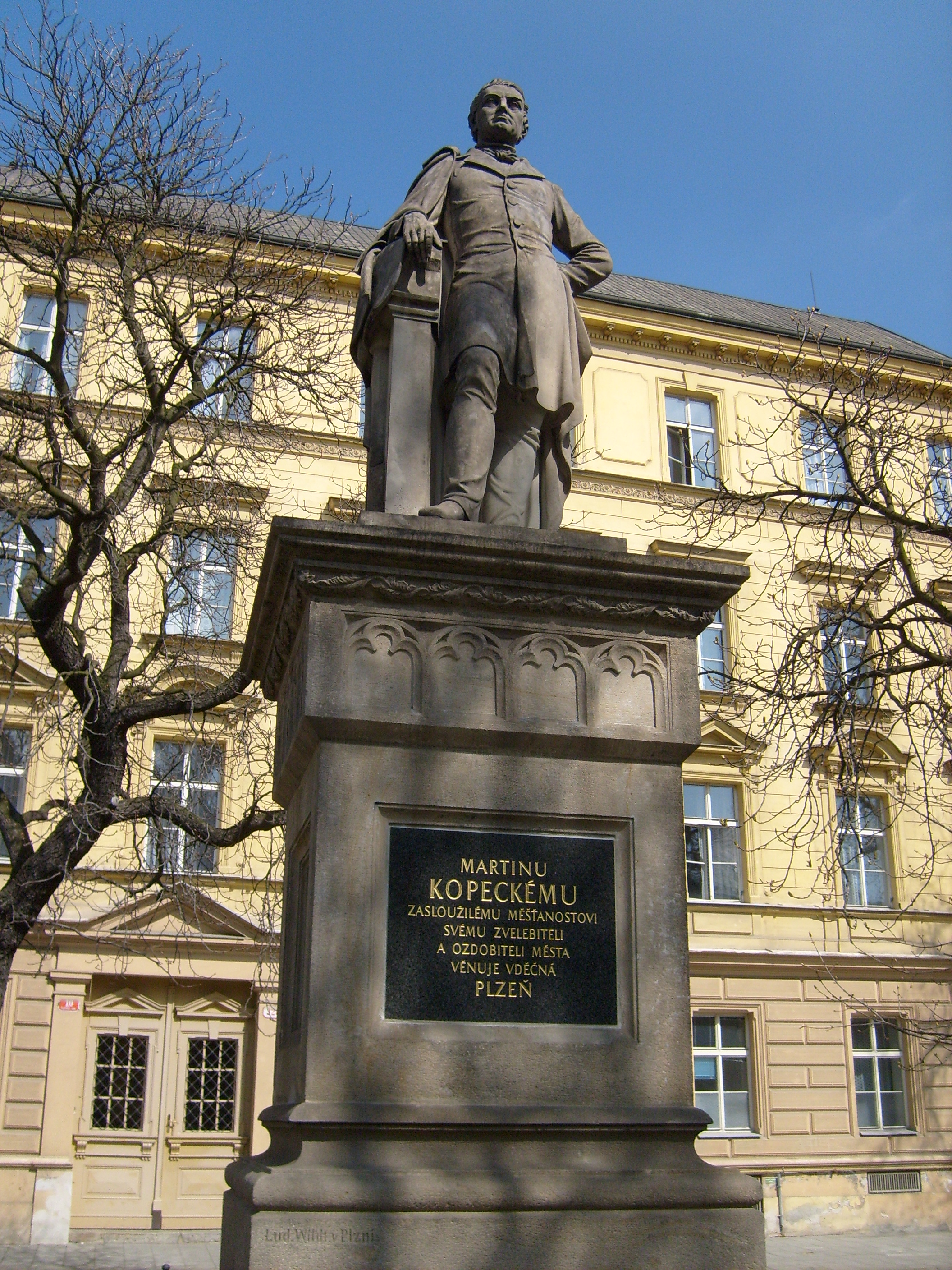 autor Antonín Wildt (1830-1883)